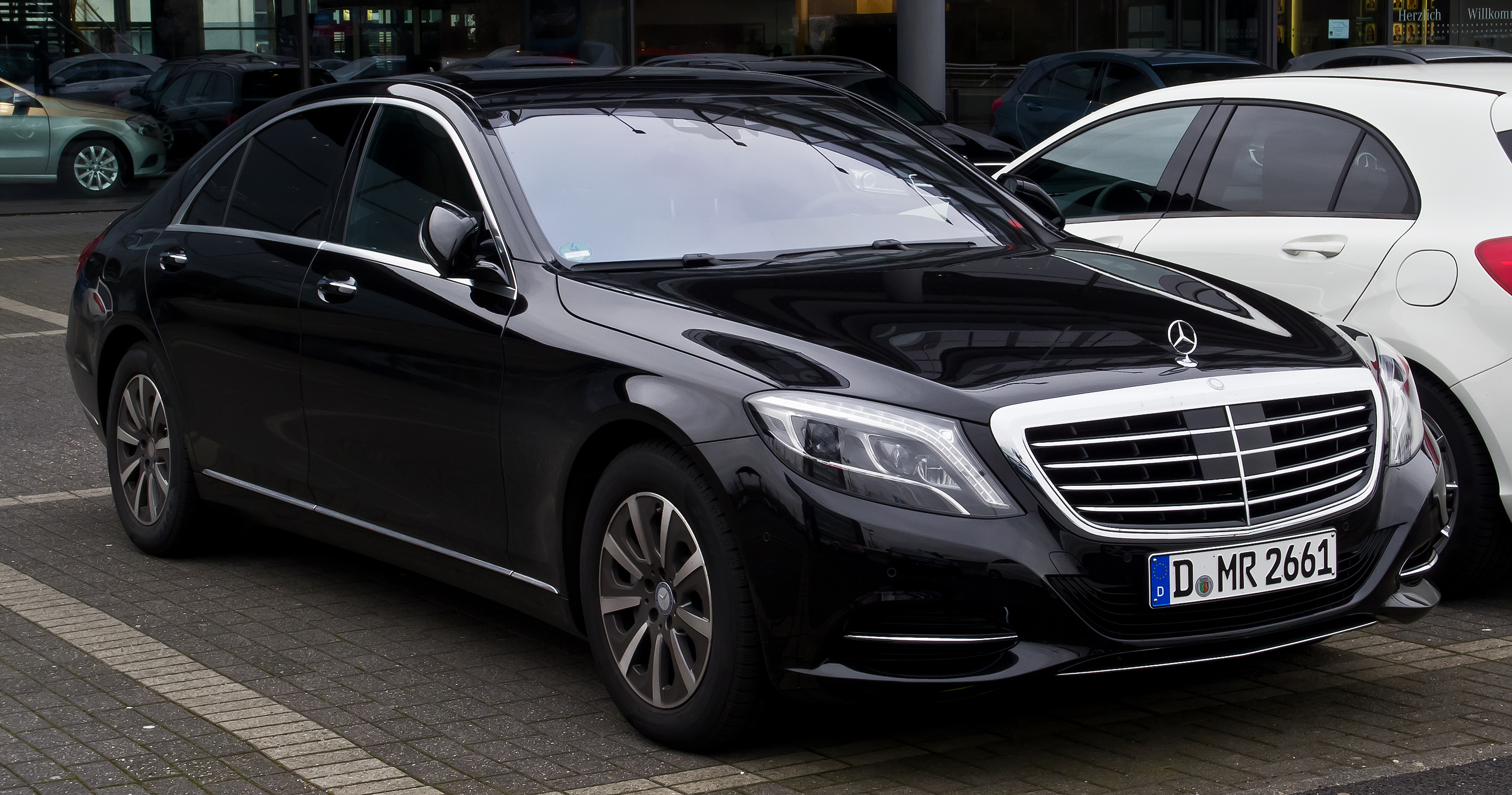 Mercedes-Benz S 350 BlueTEC (W 222)